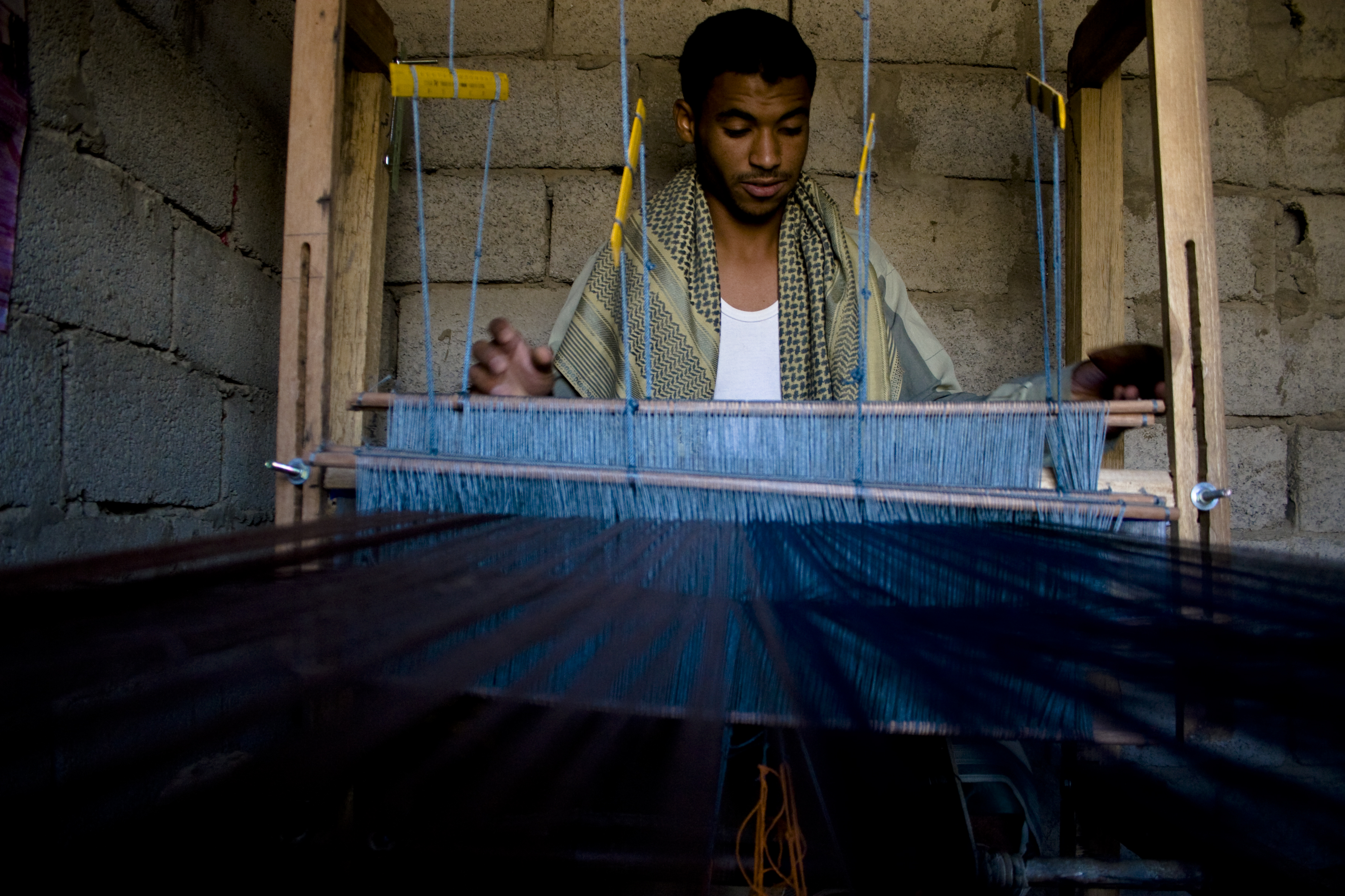 Akhdam man in Taizz, Yemen